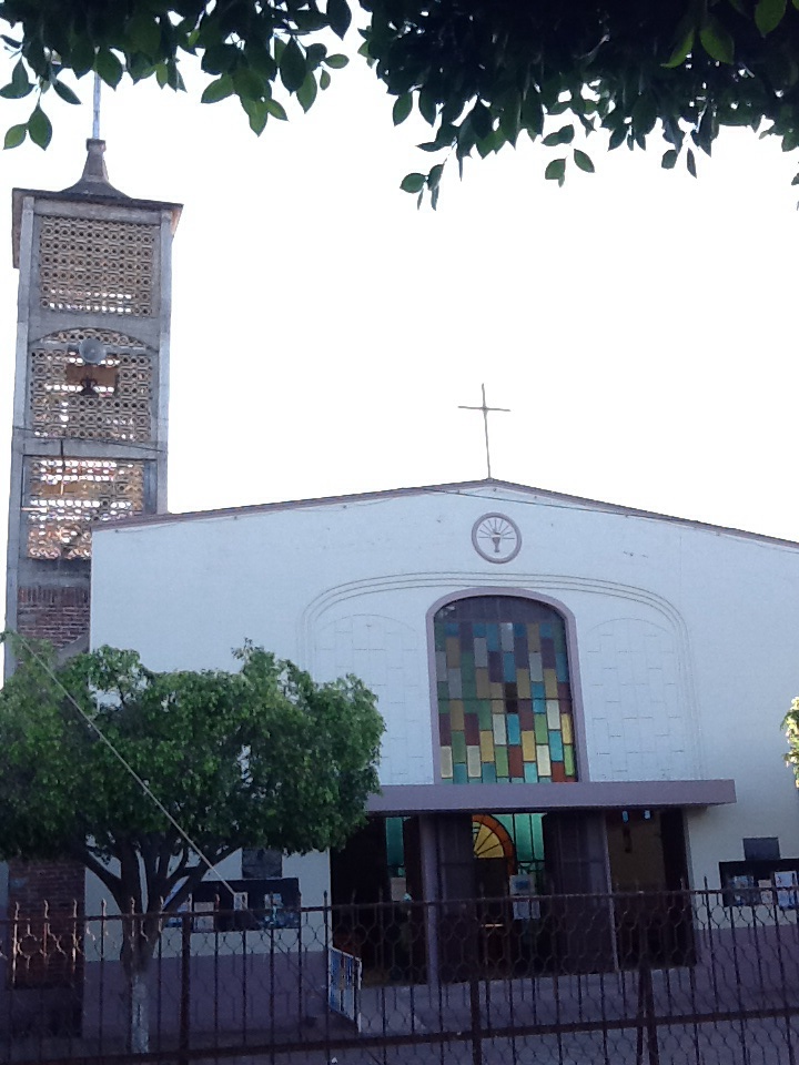 Parroquia San Antonio De Padua, El Colesio, Eucandureo. Michoacan